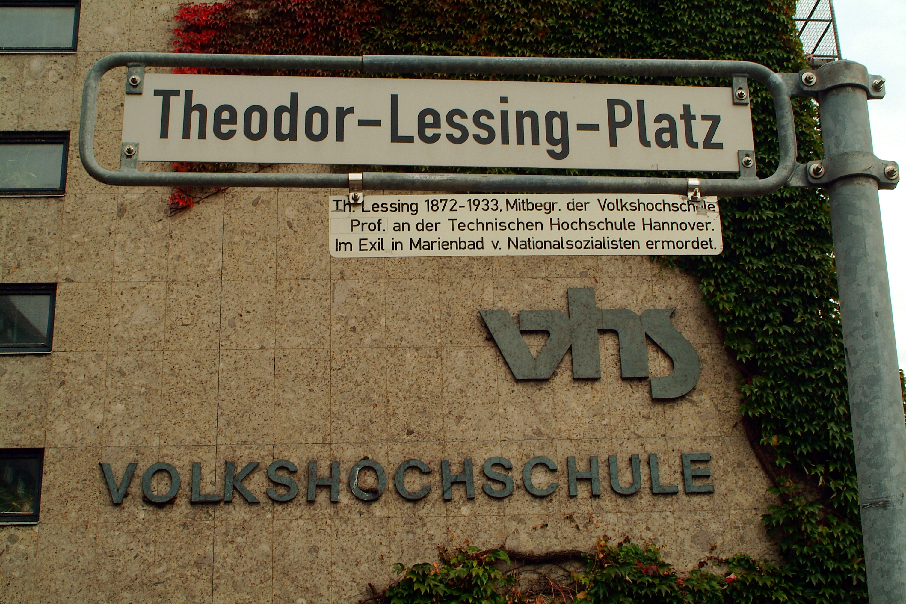 Schriftzug der Ada-und-Theodor-Lessing-Volkshochschule in Hannover hinter dem Straßenschild vom Theodor-Lessing-Platz und daran einer gesondert angebrachten Informations-Tafel zu Theodor Lessing